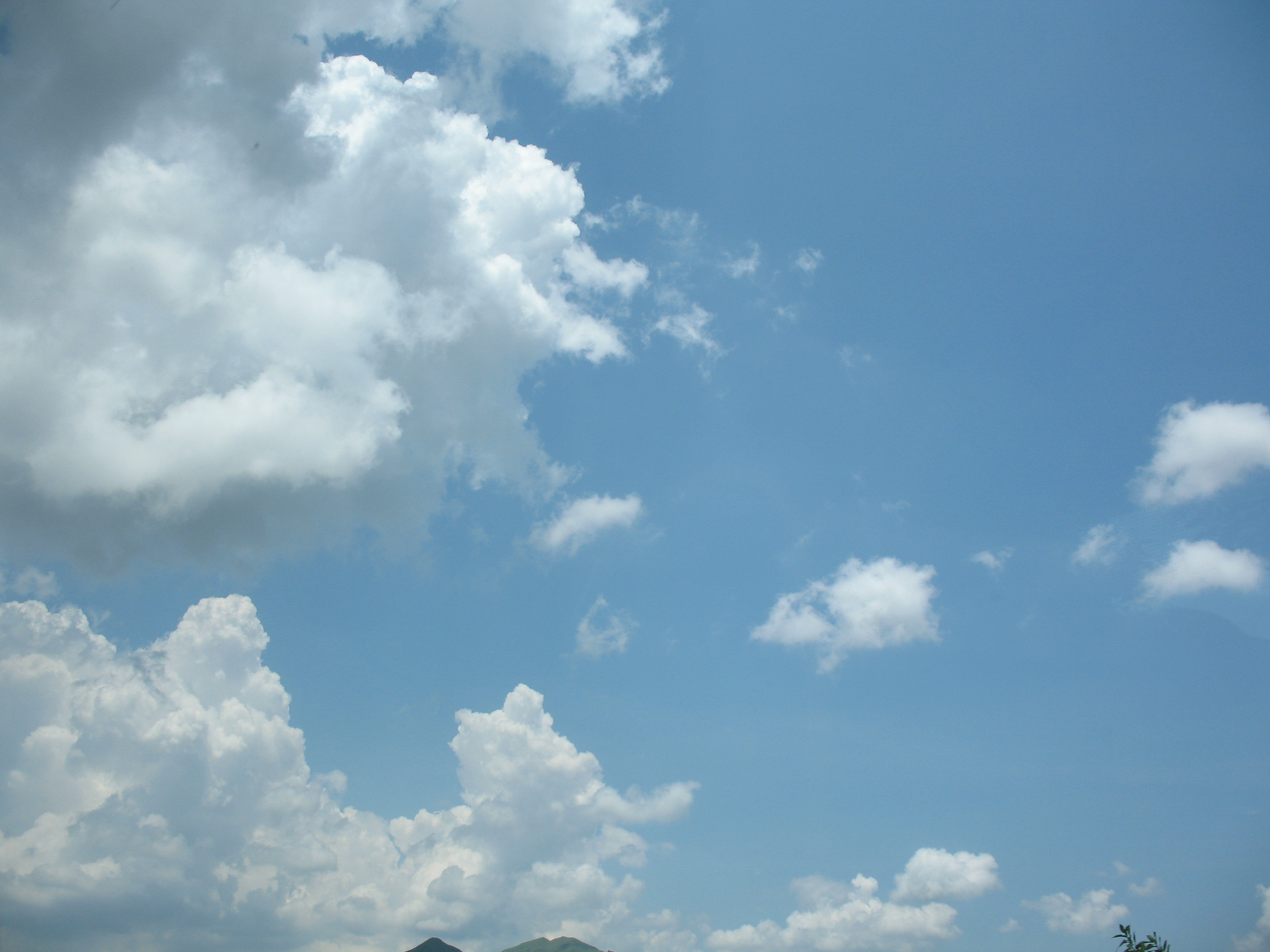 晴れた空